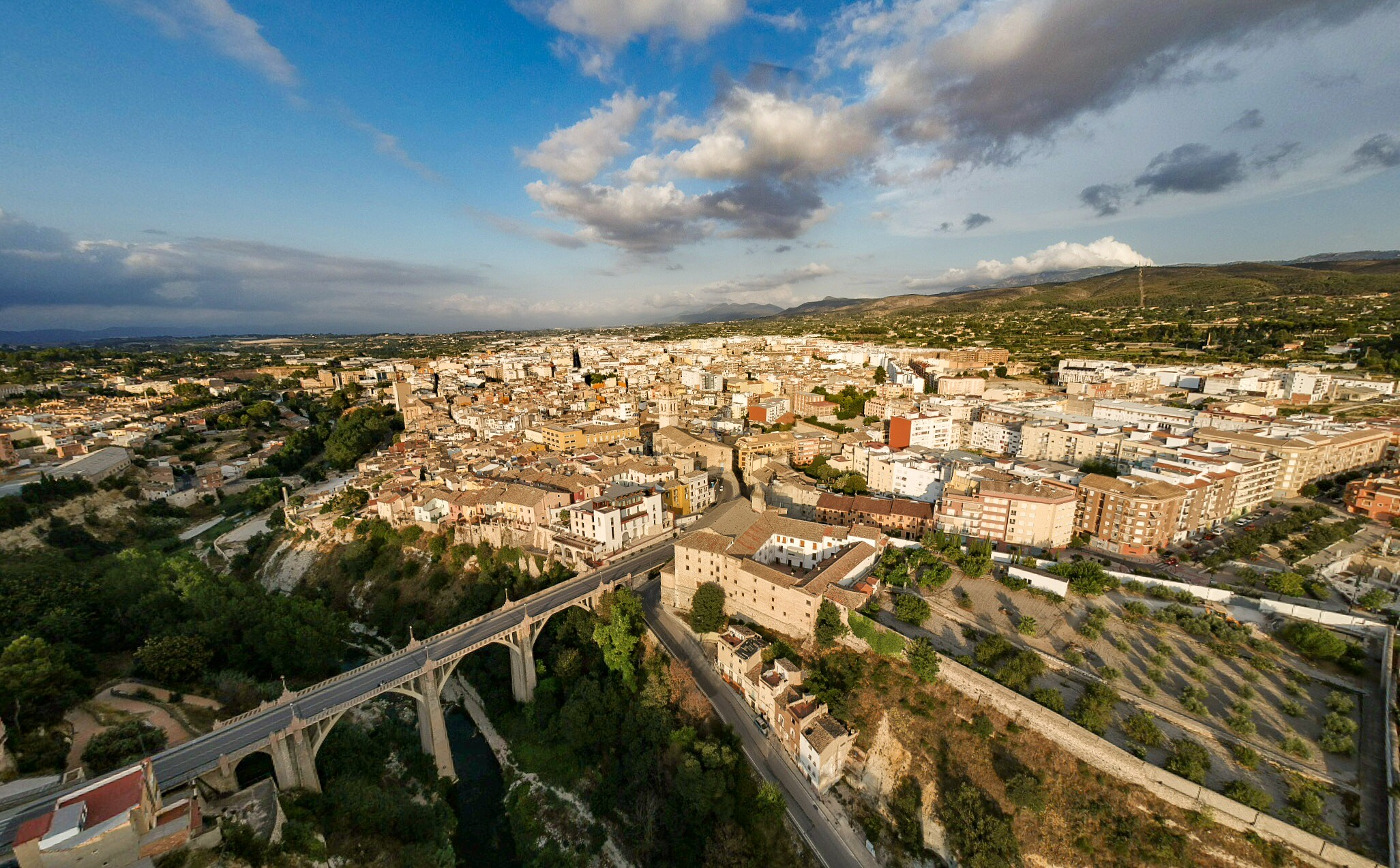 Panorama Ontiyent Spain